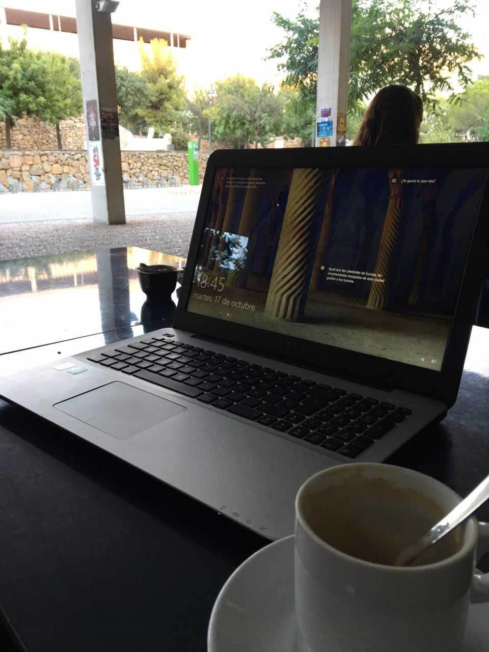 En esta imagen podemos observar un ordenador y un café, representa un momento de relajación (por el café) y de trabajo (por el ordenador), teniendo en cuenta que ambas cosas se pueden hacer a la vez.